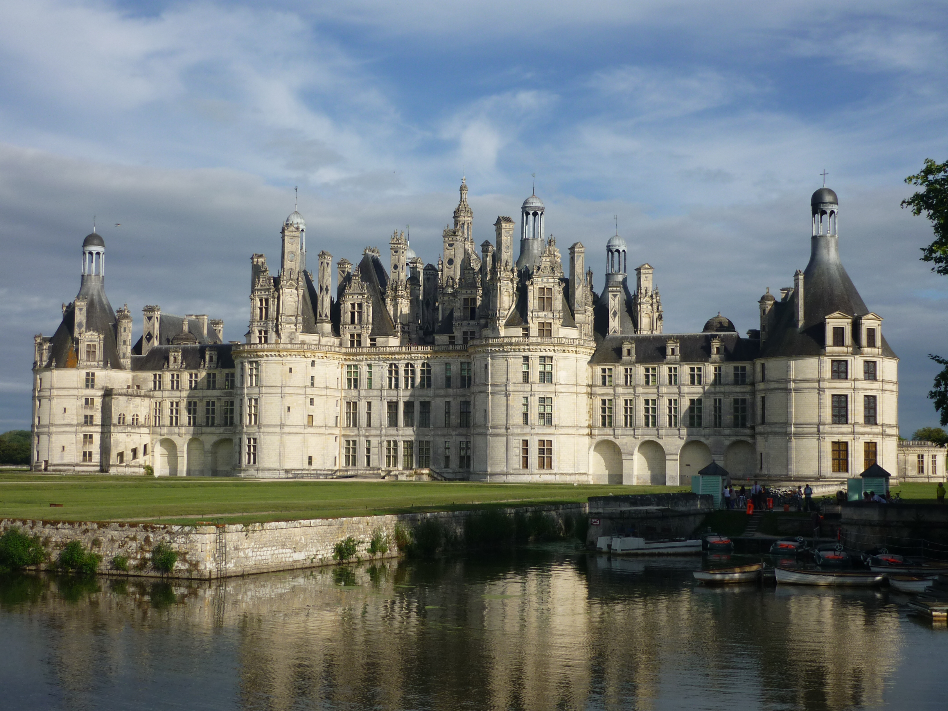 chateau de chambord .